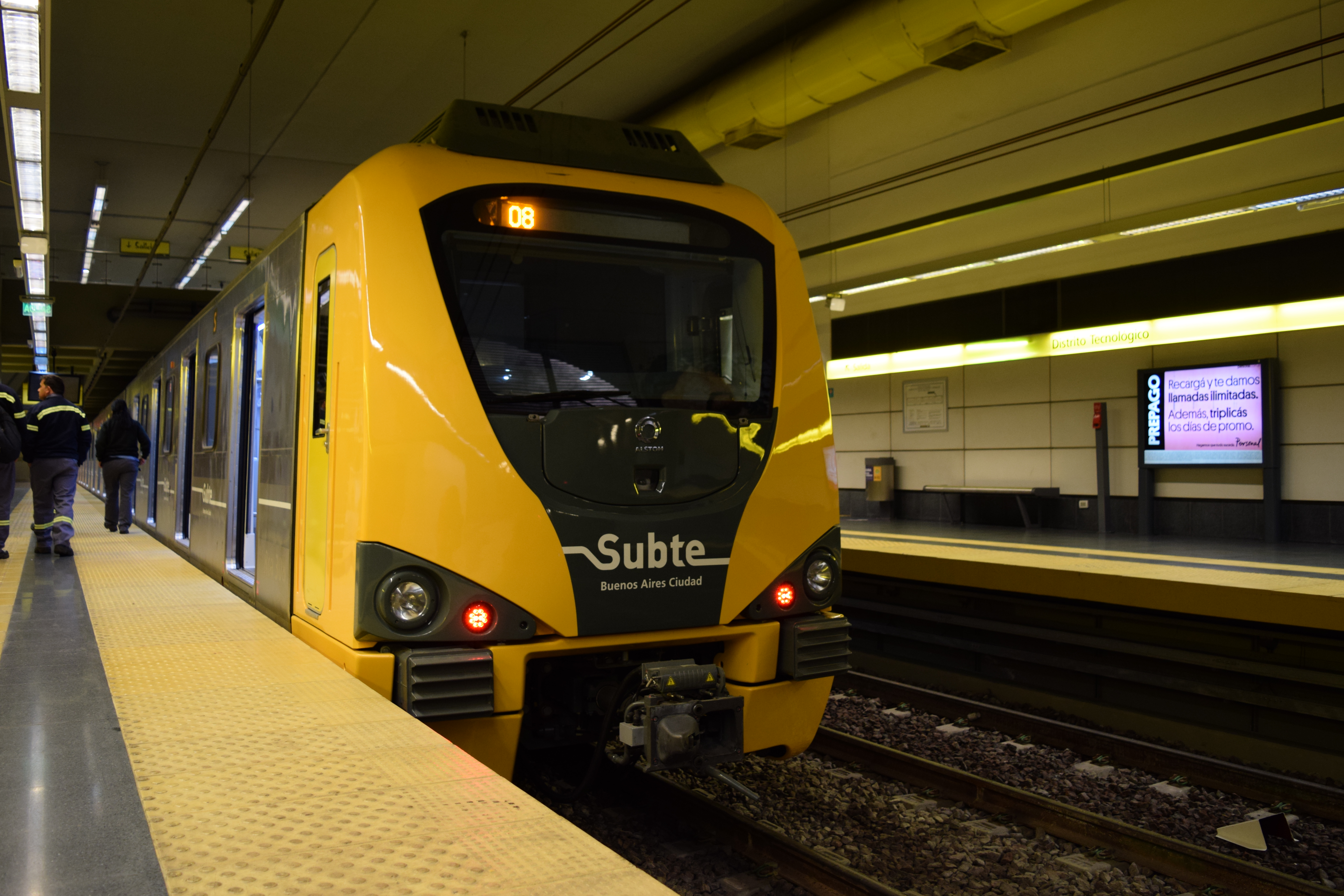 Alstom serie 300 en su primer día de funcionamiento en la línea H del Subte de Buenos Aires.